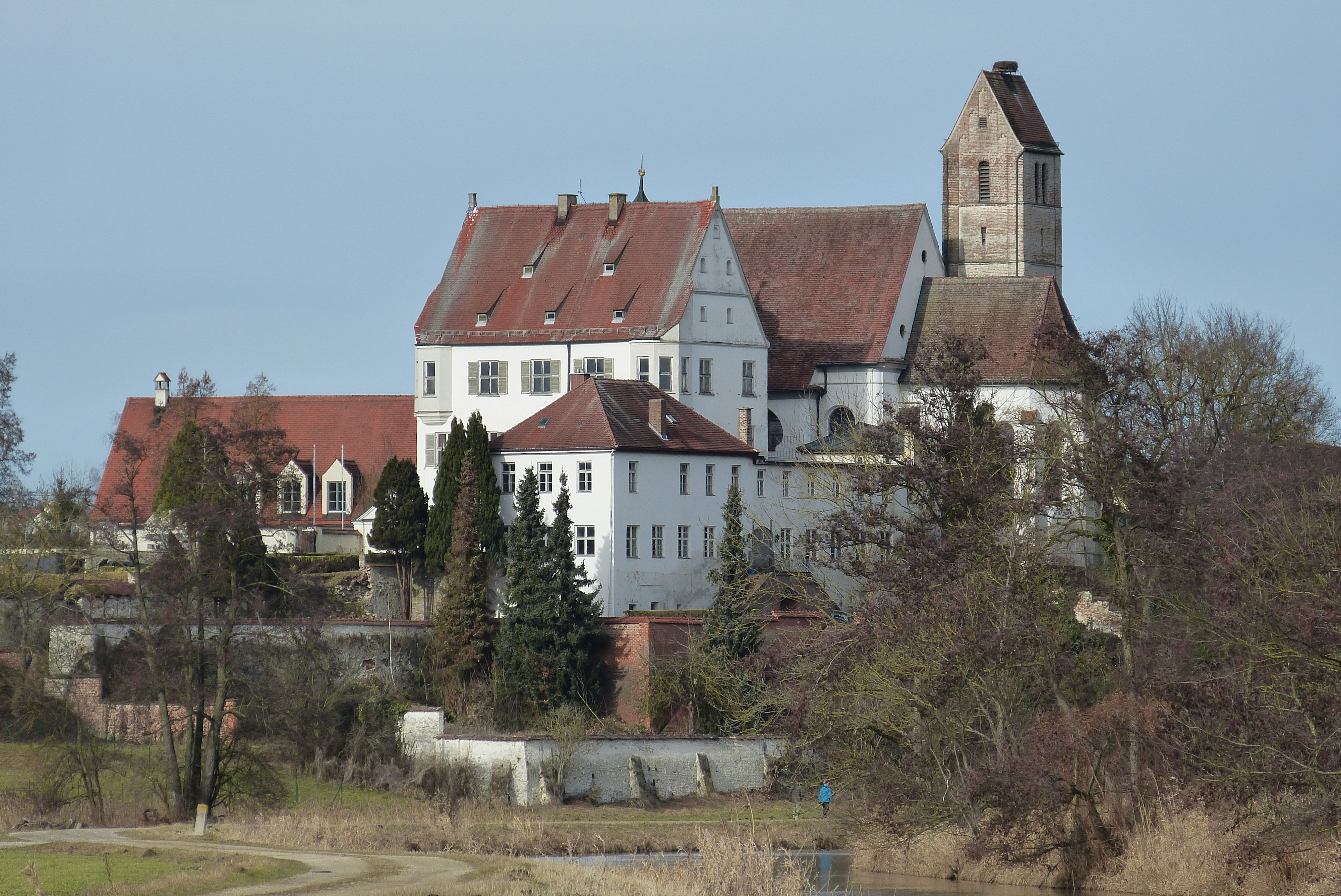 Schloss Gablingen, von Süden fotografiert. Dahinter der Turm der Dorfkirche St. Martin